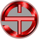 PT Safari Java Trans logo